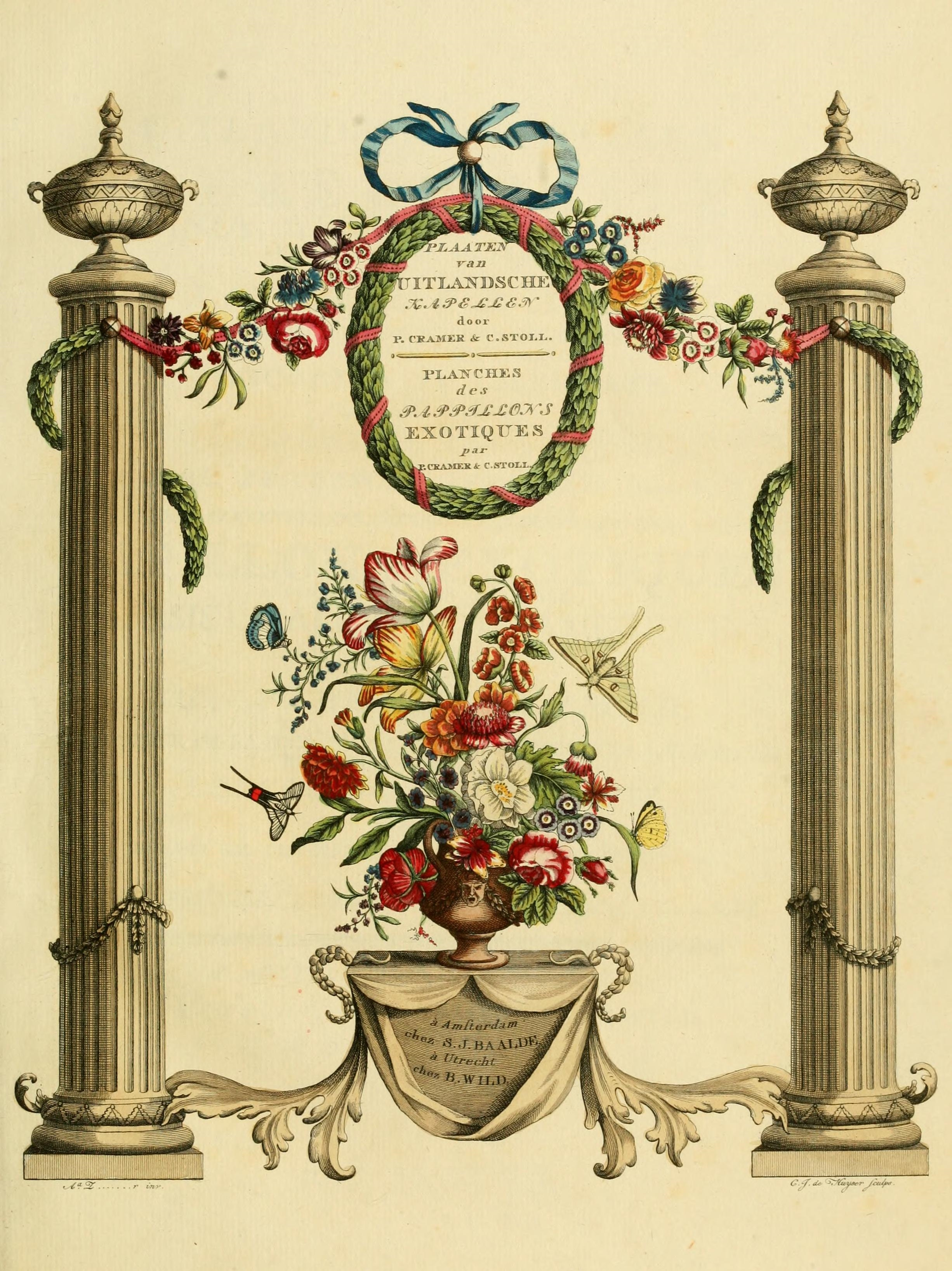 Frontispiece 2